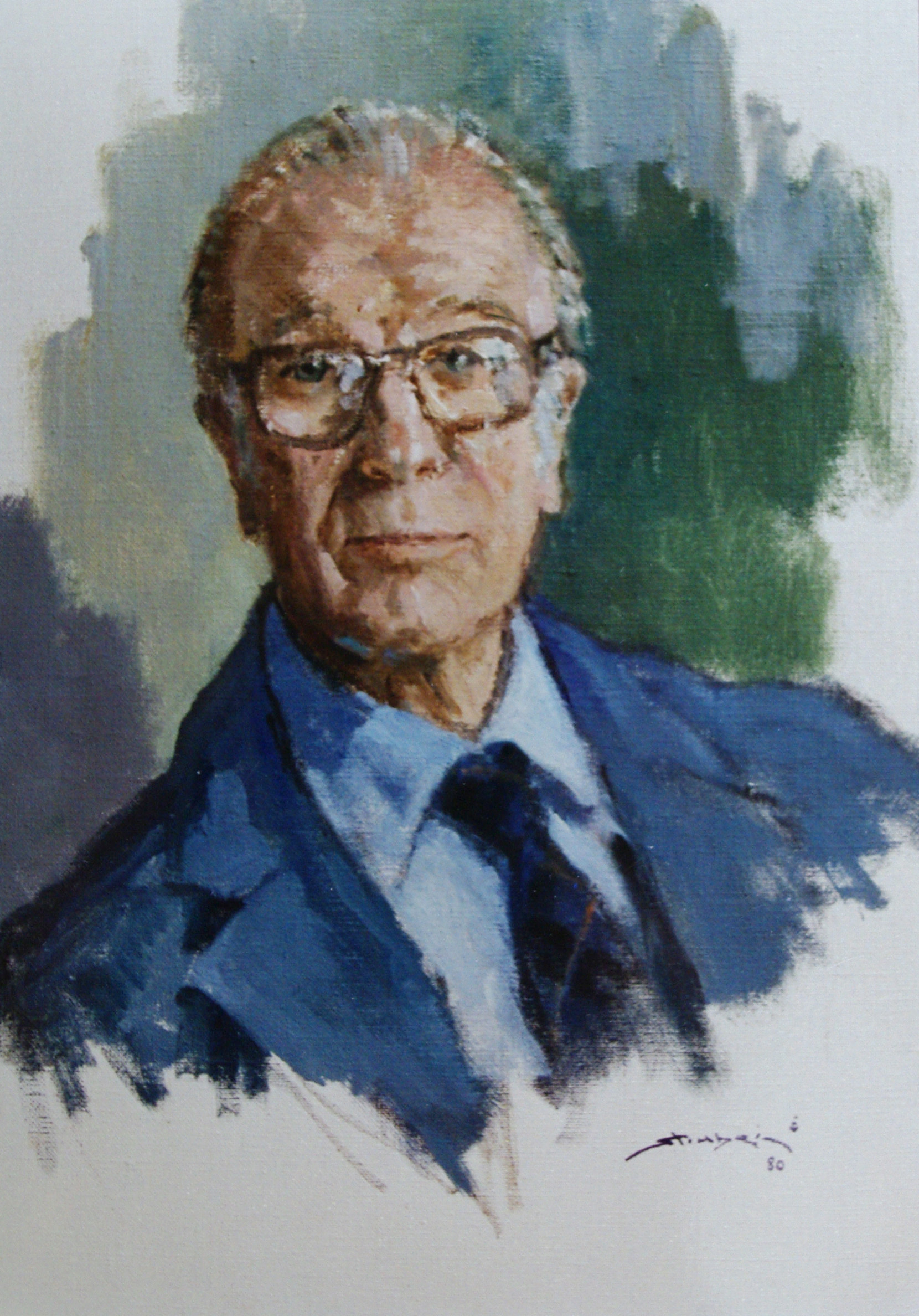 Ulei pe pânză, 1980, 40/50 cm, Muzeul Academiei Navale „Mircea cel Bătrân” Donație Mario Ricci